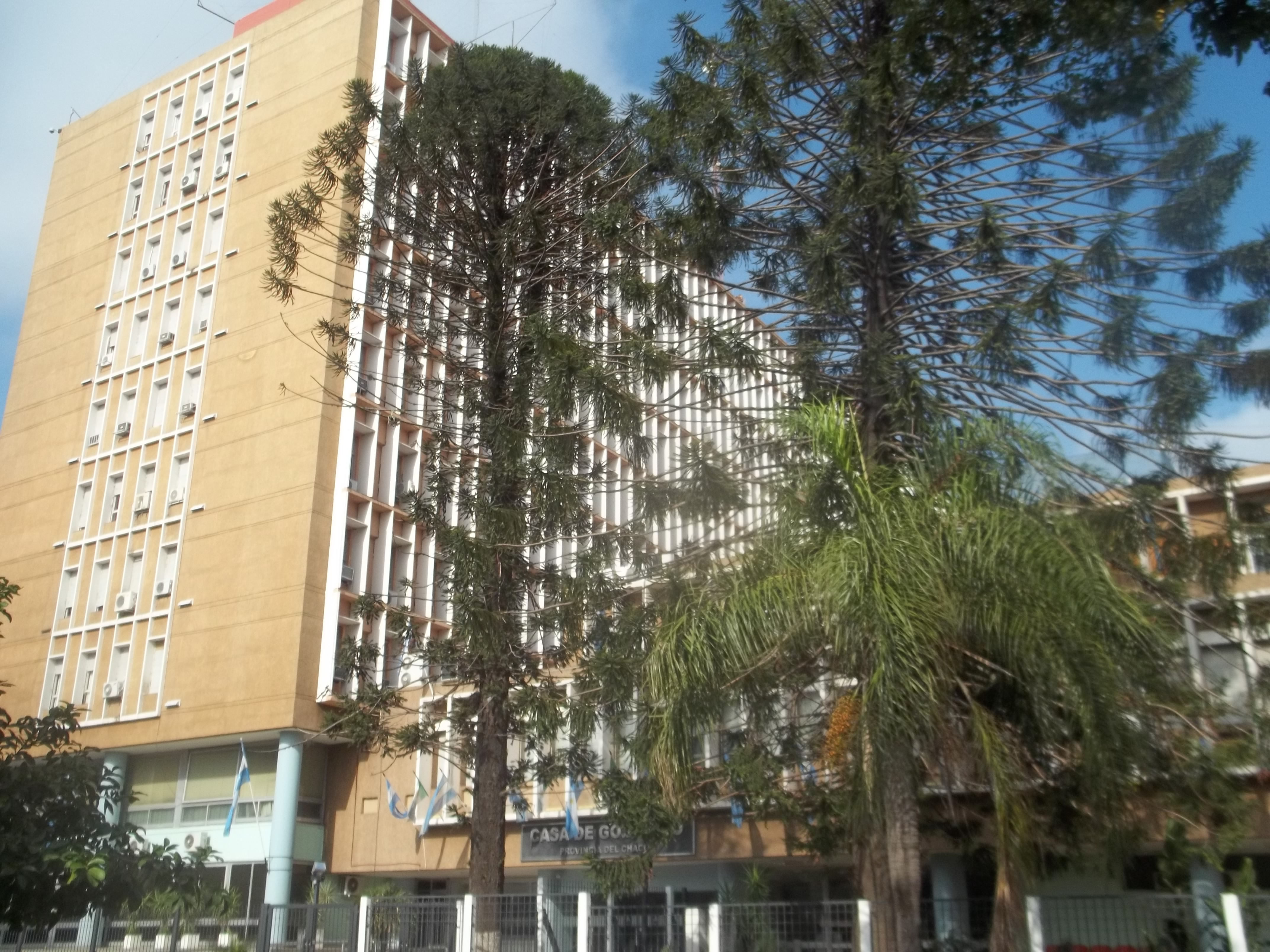 Vista de la Casa de Gobierno de la Provincia del Chaco desde la vereda de enfrente a la entrada principal (calle Marcelo T. de Alvear)